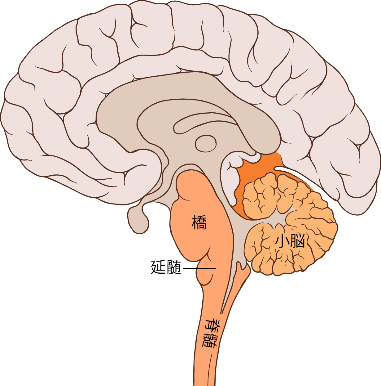 皮質延髄路は大脳皮質を脳幹と繋げる経路である。